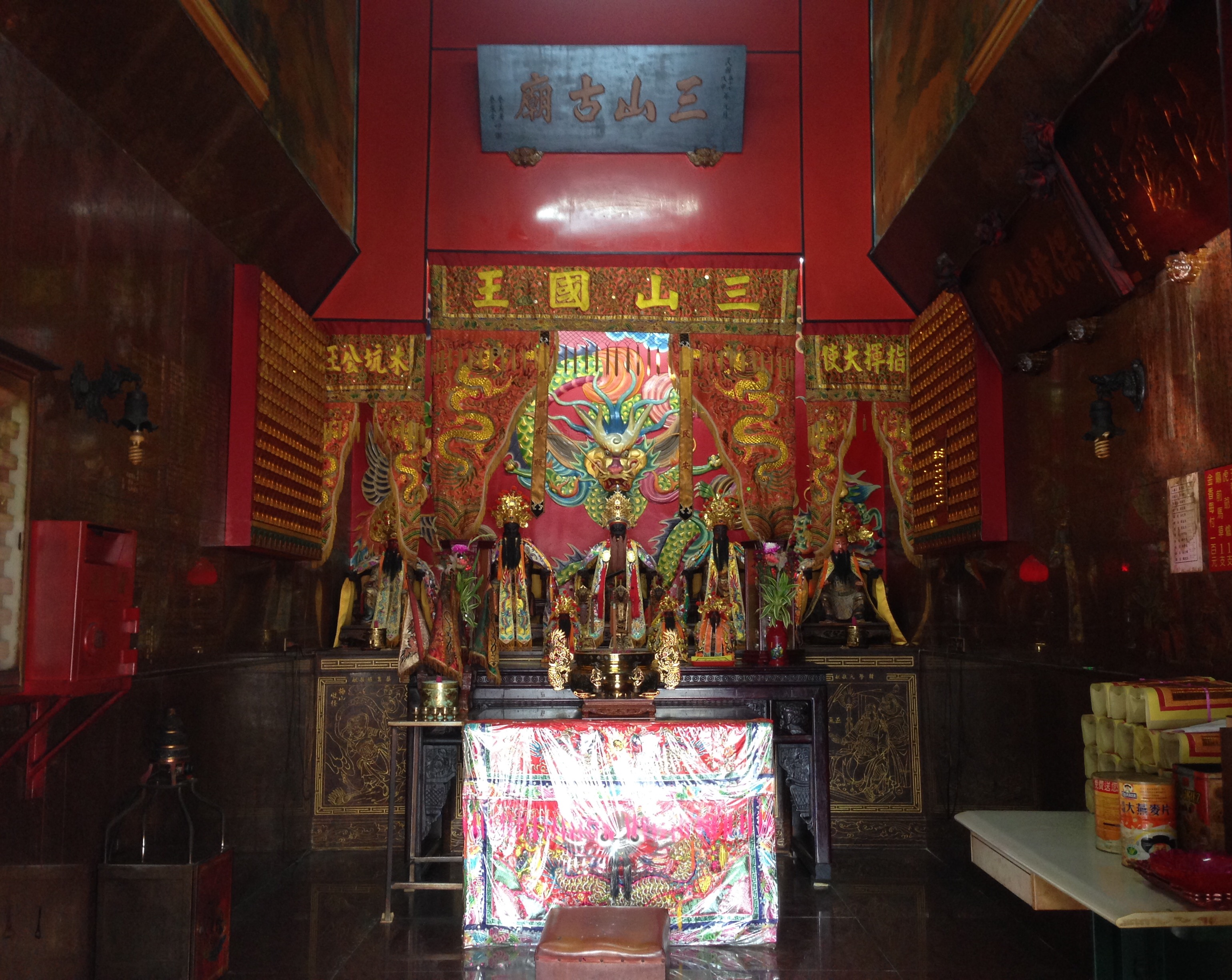 中文（台灣）: 林仔內三山國王廟內